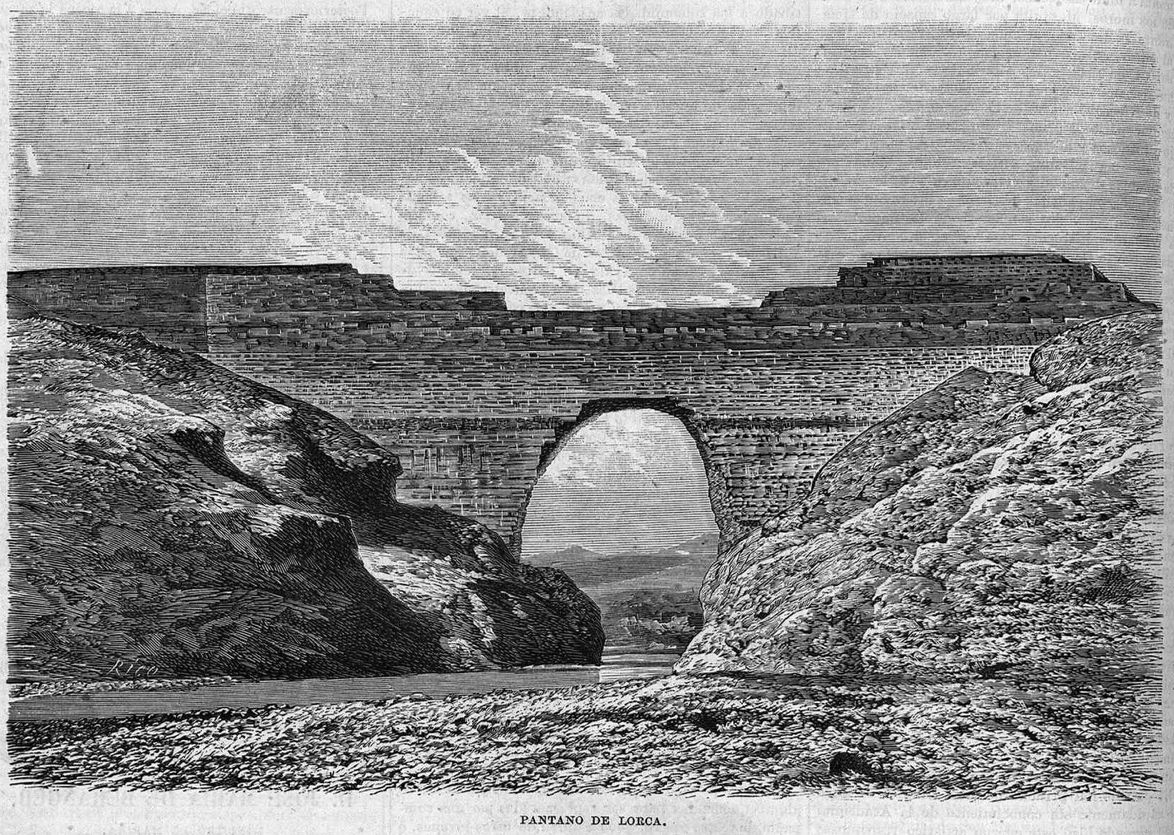 Pantano de Lorca, en la revista La Ilustración de Madrid.